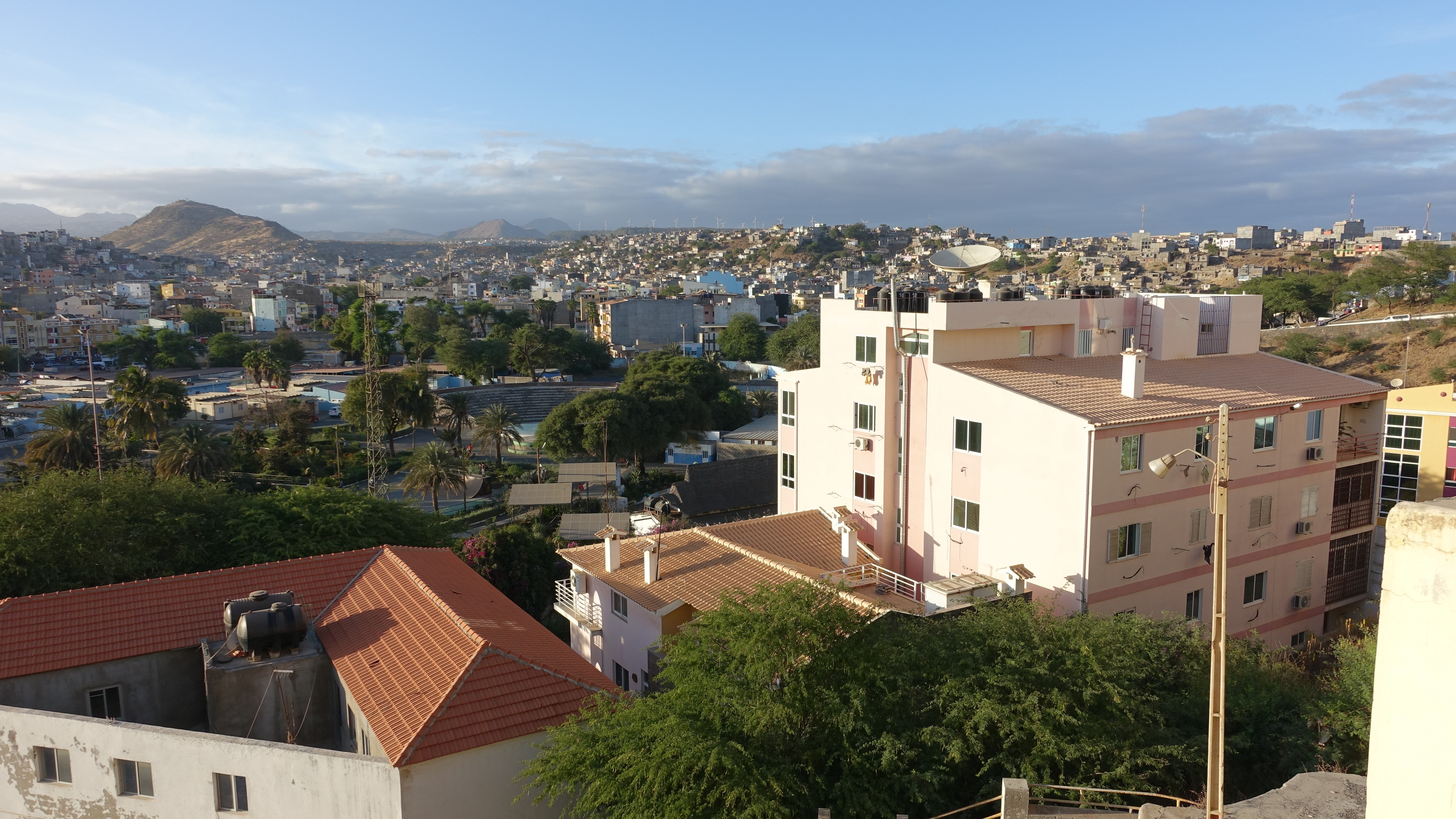 Praia - Stadt vom Plateau